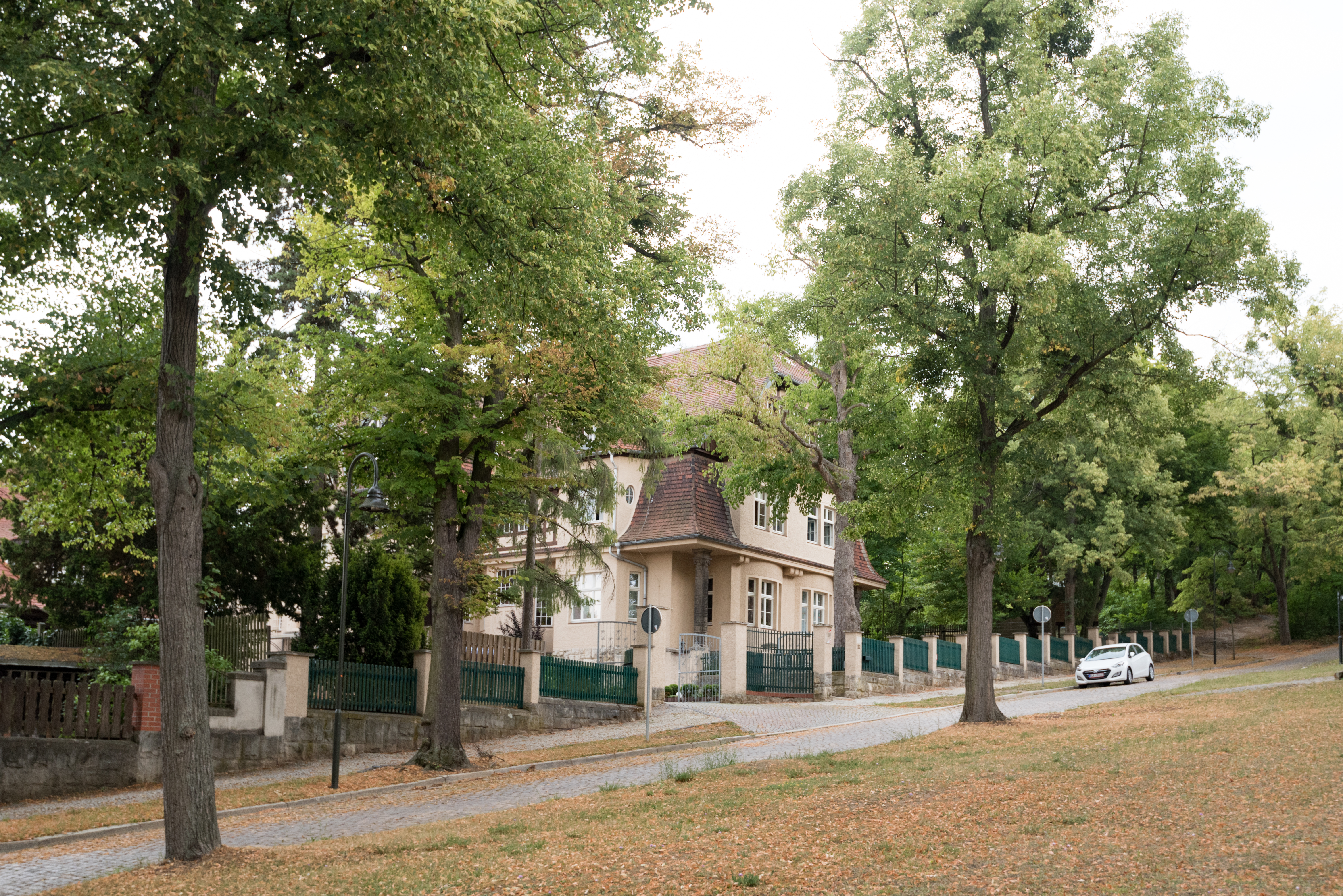 Naumburg (Saale), Kirschberg 12